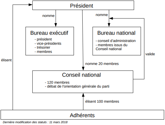 Statuts du Rassemblement national (ex Front national) depuis le 11 mars 2019.